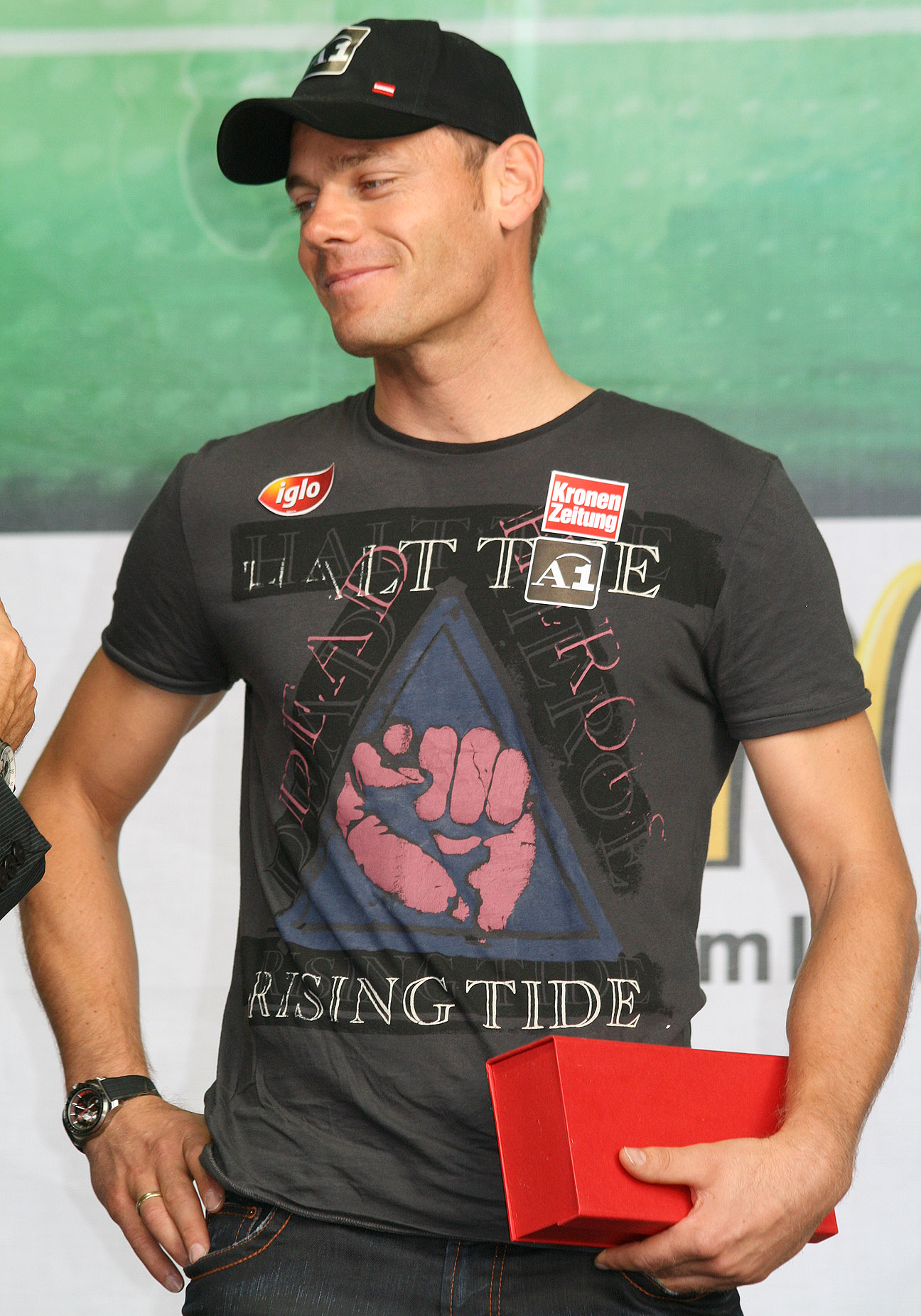 Michael Walchhofer am Tag des Sports 2009 auf dem Heldenplatz in Wien